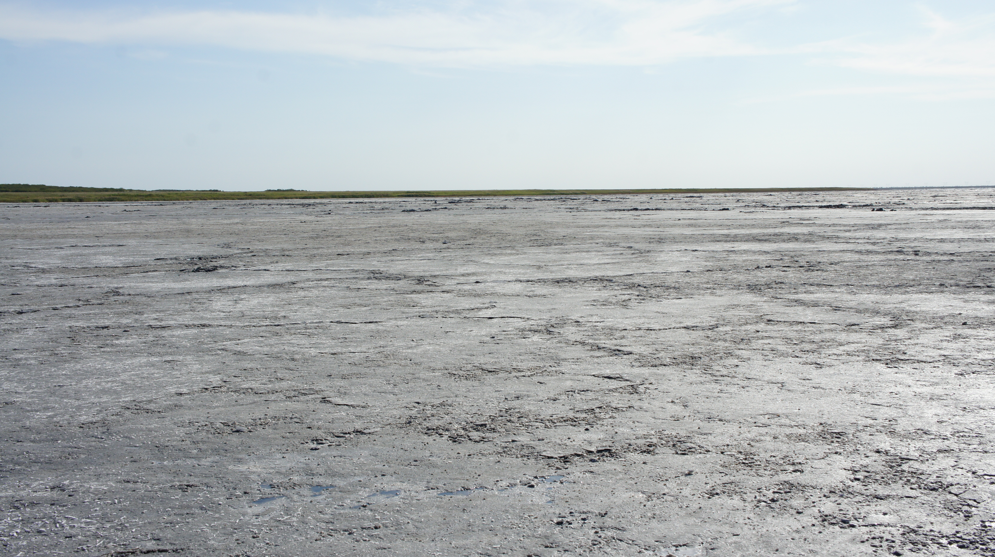 Мормышанское солёное озеро в Романовском районе Алтайского края.